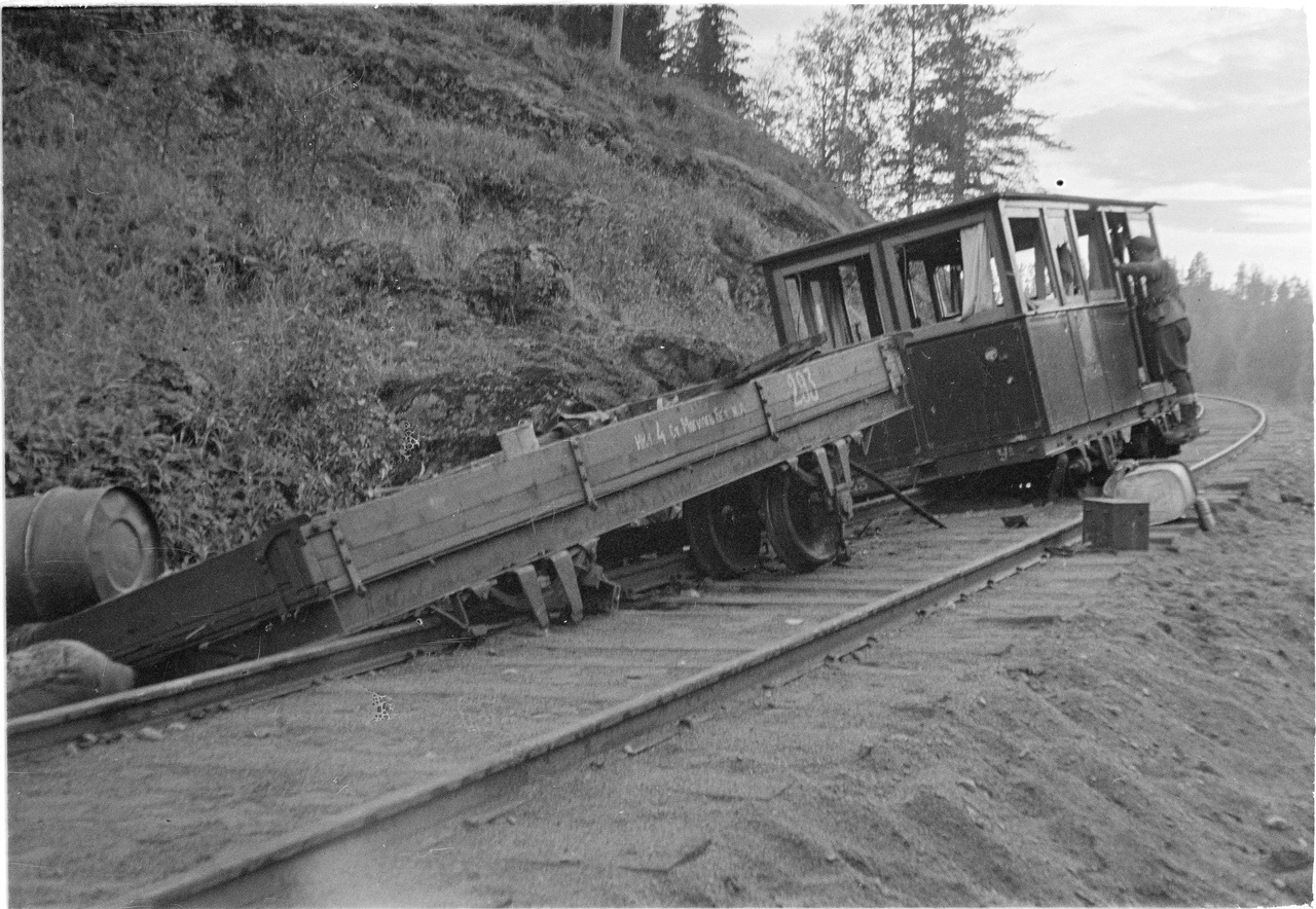 Лейнъярви